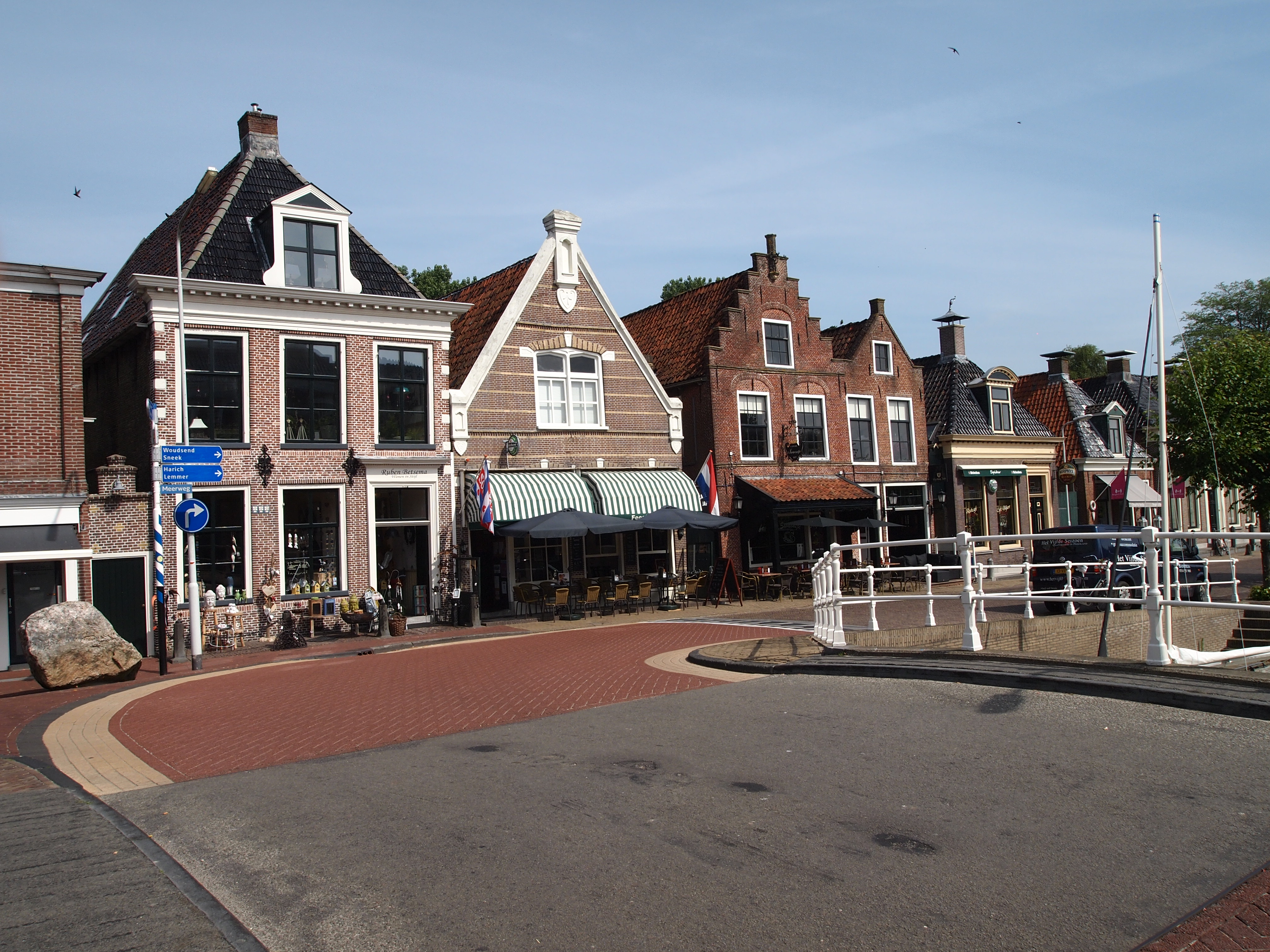 Meerweg Centrum